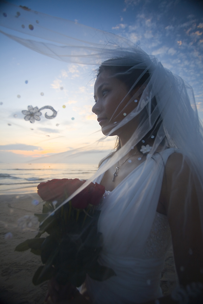 Trang xinh